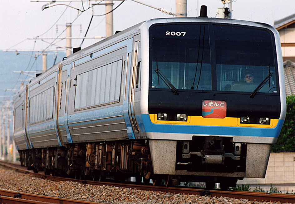 JR四国2000系気動車 「しまんと」